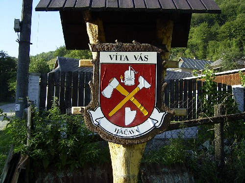 Ortseingang von Hacava (Herzlich Willkommen)